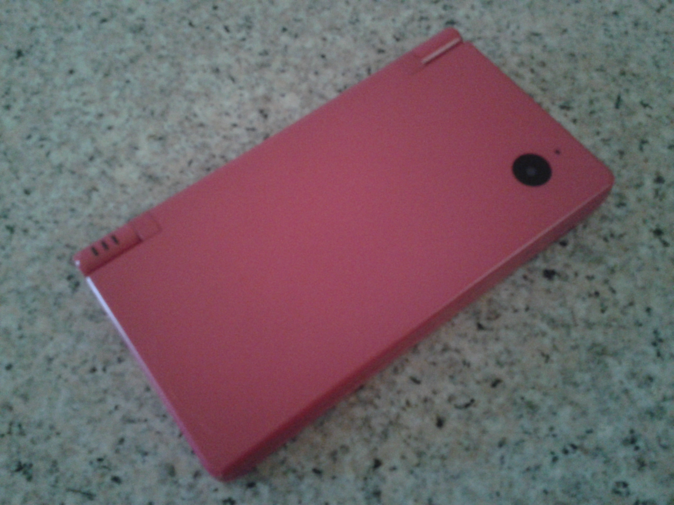 Nintendo DSi rosa